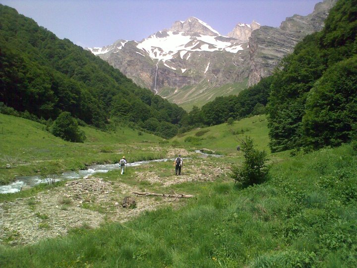 Поглед кон корабски водопад од долината на Длабока Река